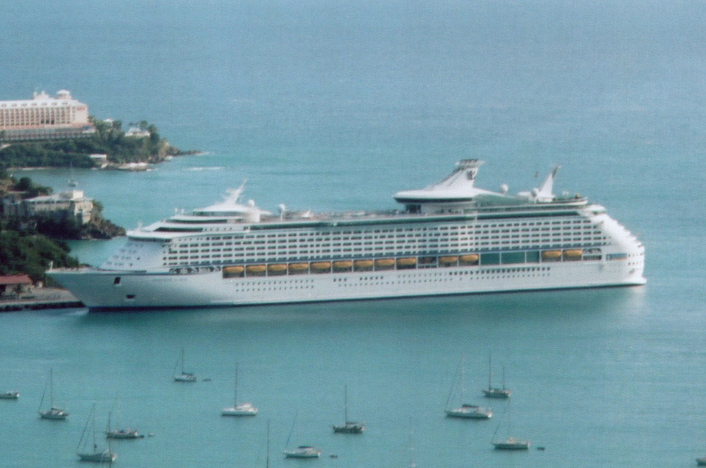 Seitenansicht der Explorer of the Seas, vor Anker in Charlotte Amalie, Saint Thomas, U.S. Virgin Islands.